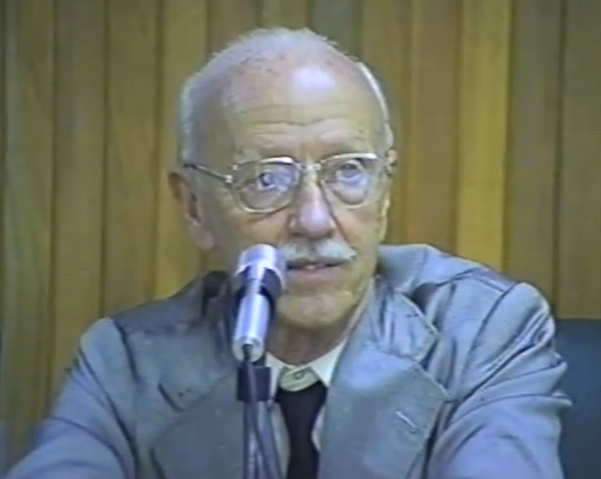 Hélio Bicudo discursando em 25 de outubro de 1991.